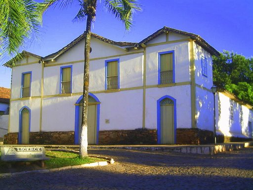 Facahada da Igreja de Nossa Senhora do Carmo, Pirenópolis, Construída entre 1750 a 1754.